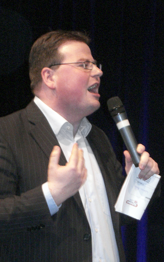 Der Sportmoderator Mirko Heintz vom Sender Radio MK bei der Saisonabschlussfeier 2007 der Iserlohn Roosters